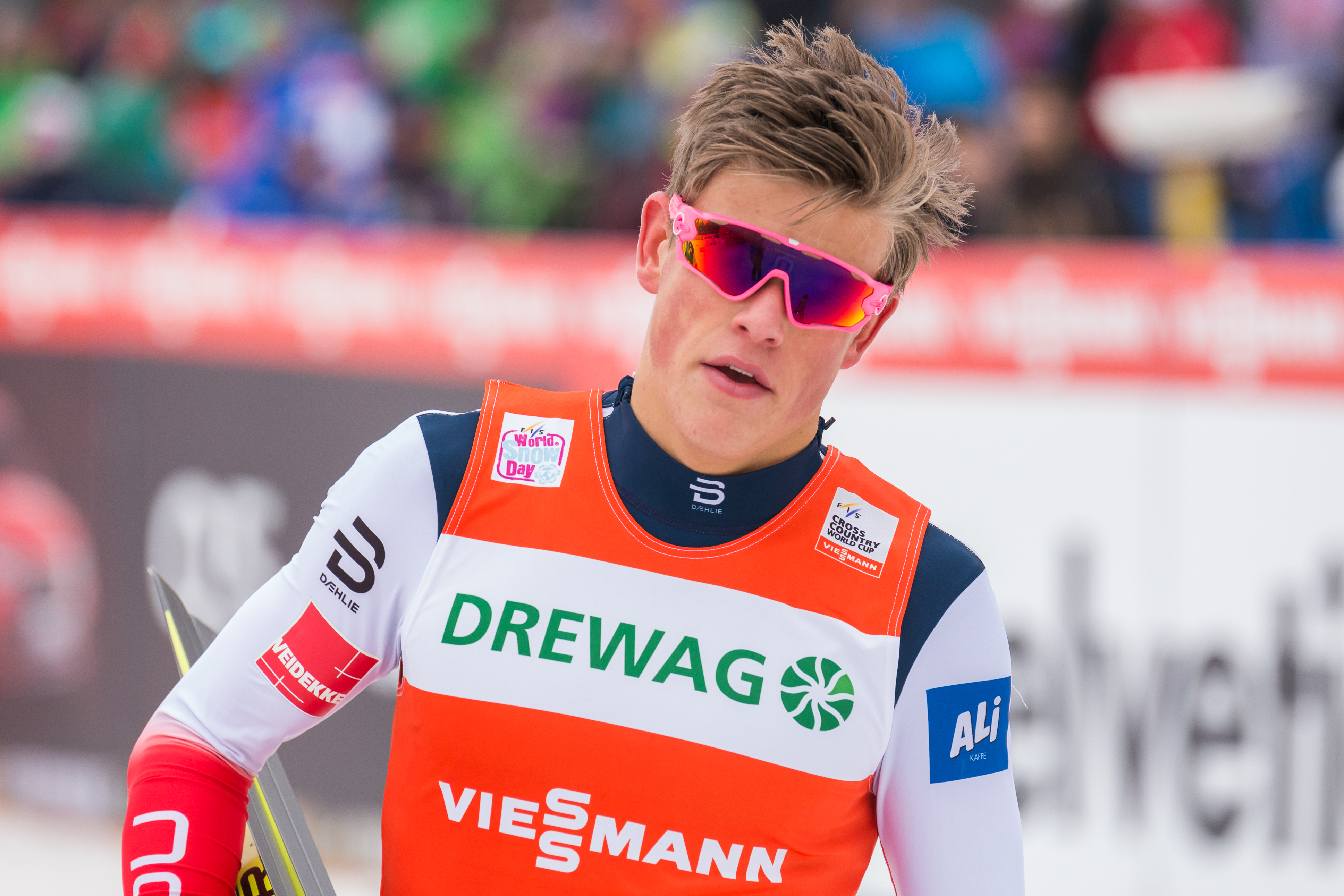 Johannes Hoesflot Klaebo (NOR, Norwegen) (Zweitplatzierter, Silbermedaille, silver medal)